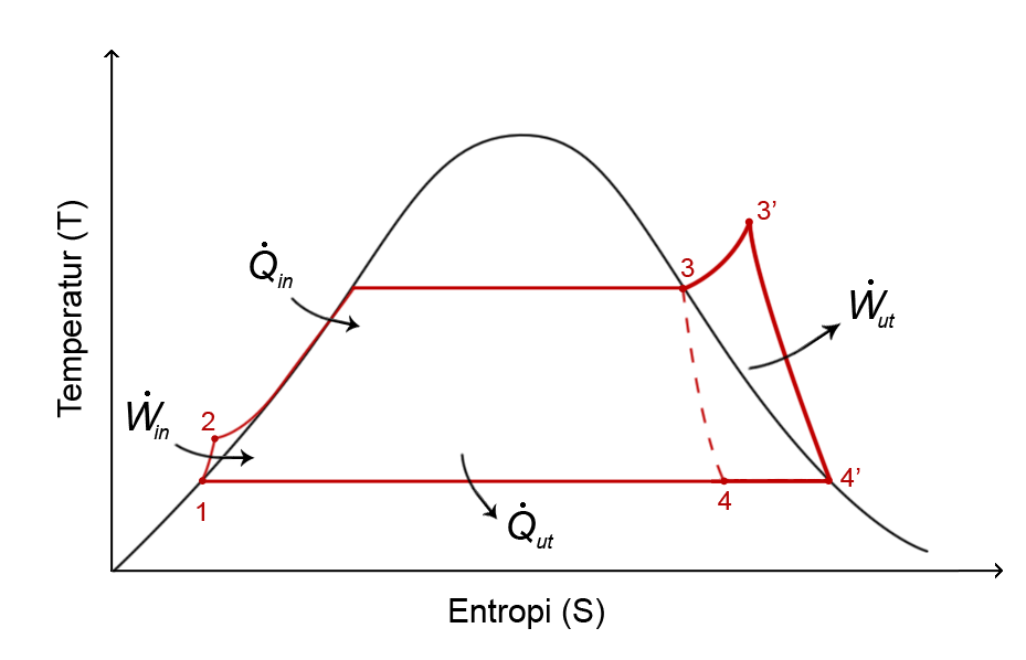 Rankinecykel med överhettning i TS-diagram